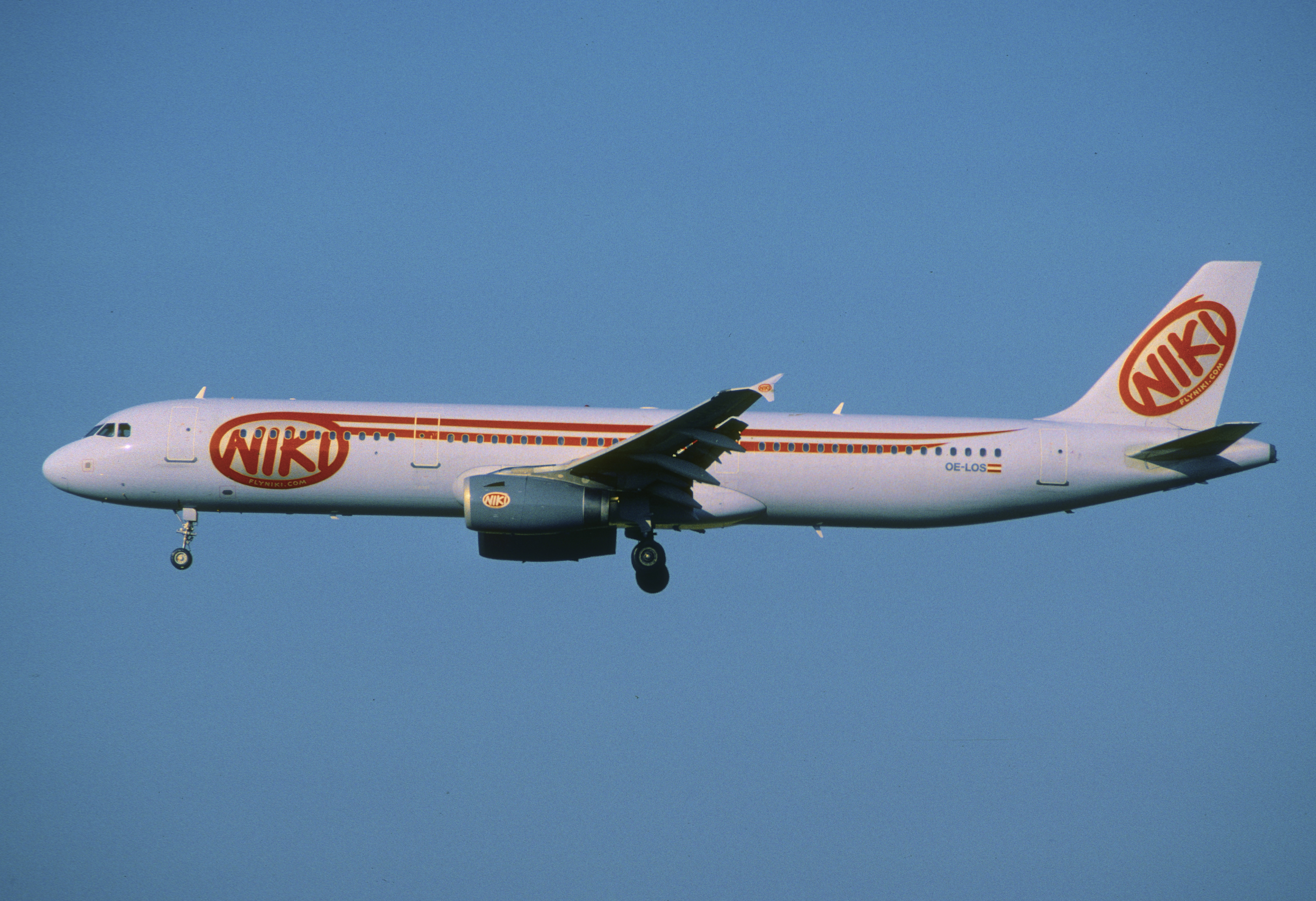 412an - Niki Airbus A321-231; OE-LOS@ZRH;03.07.2006